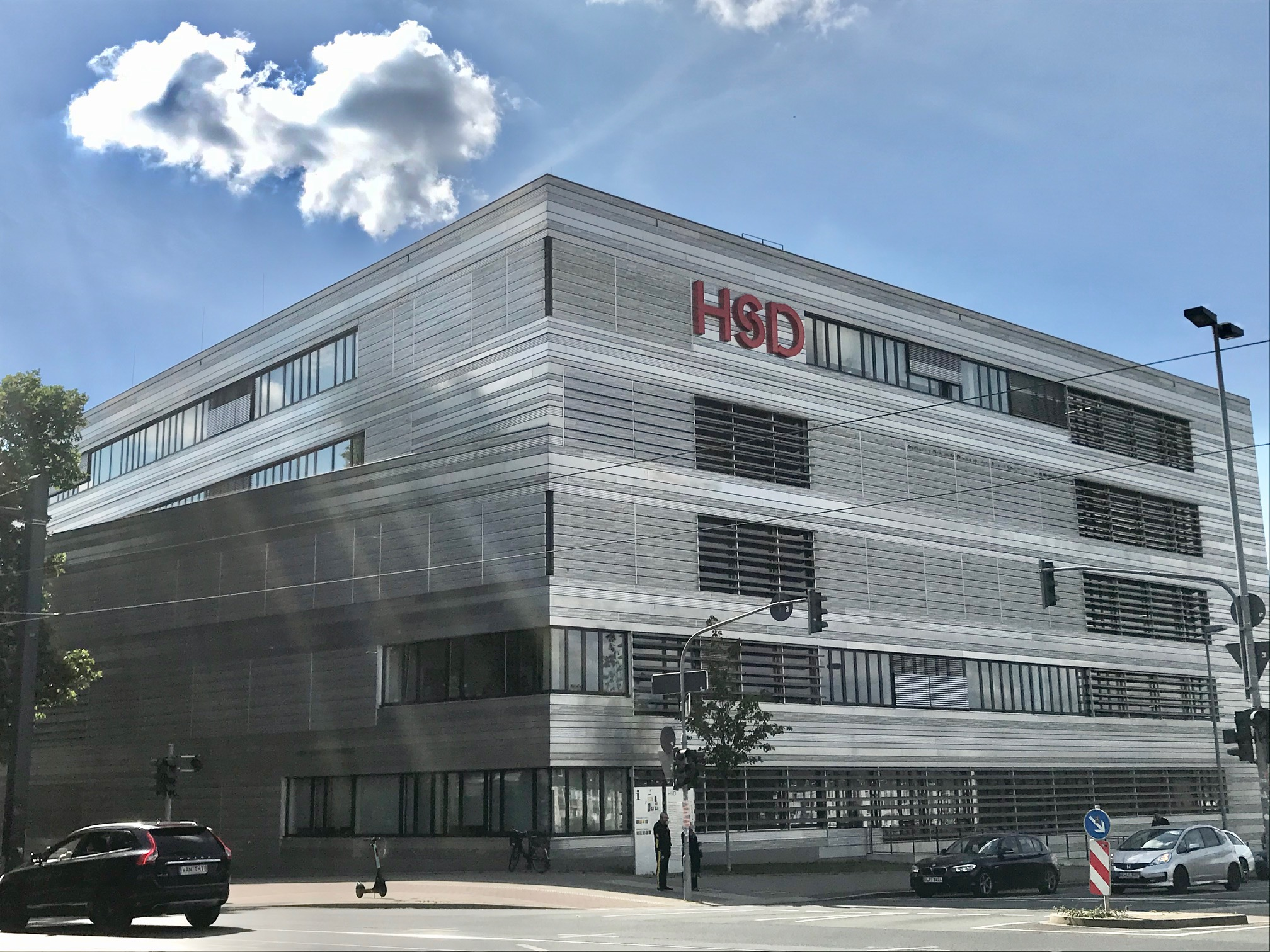 Hochschule Düsseldorf - Gebäude 5 - Fachbereich Elektro- und Informationstechnologie / Fachbereich Maschinenbau und Verfahrenstechnik